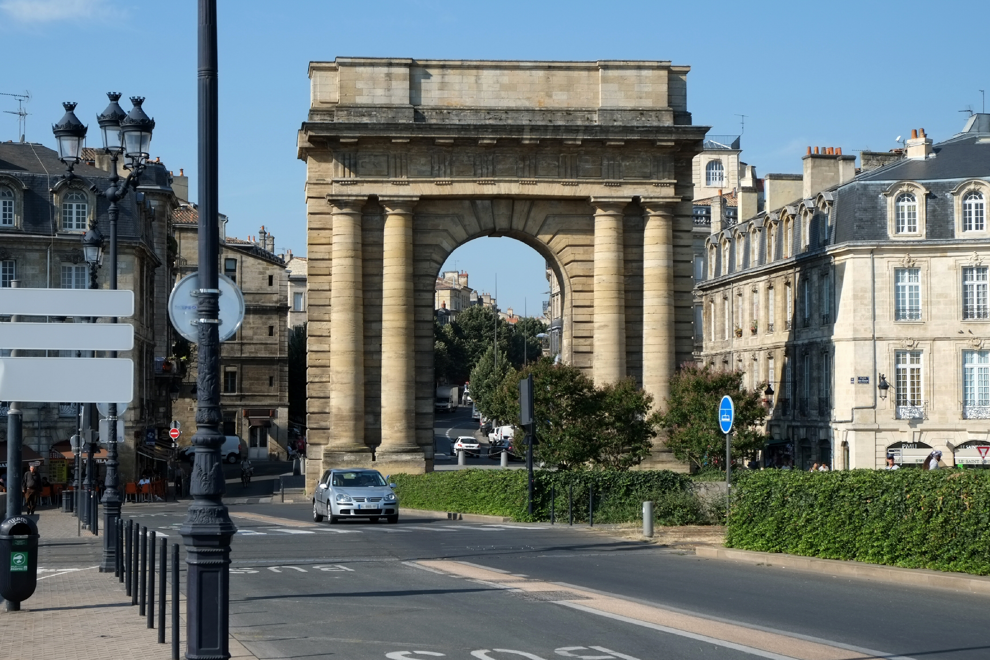 Porte de Bourgogne Bordeaux Gironde France